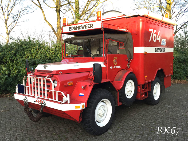 DAF-YA126 Brandweerwagen - commandowagen voor vliegbasis van de luchtmacht (1958-1999).